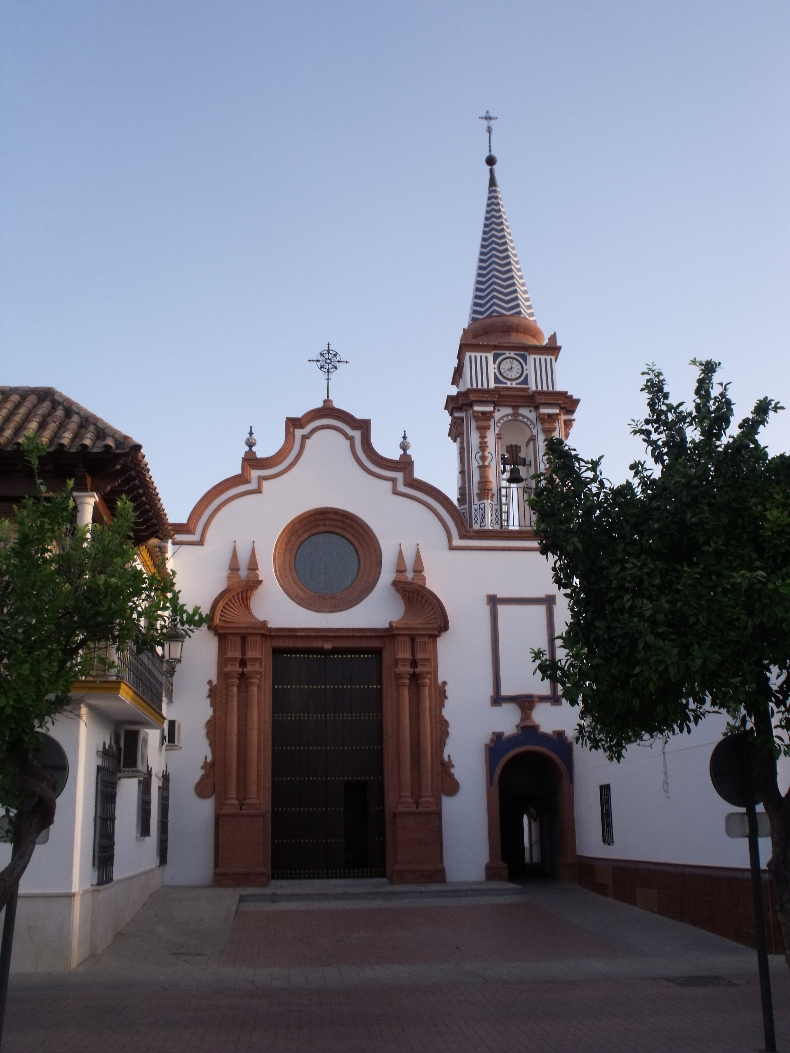 Vista general de la iglesia de Santa Ana